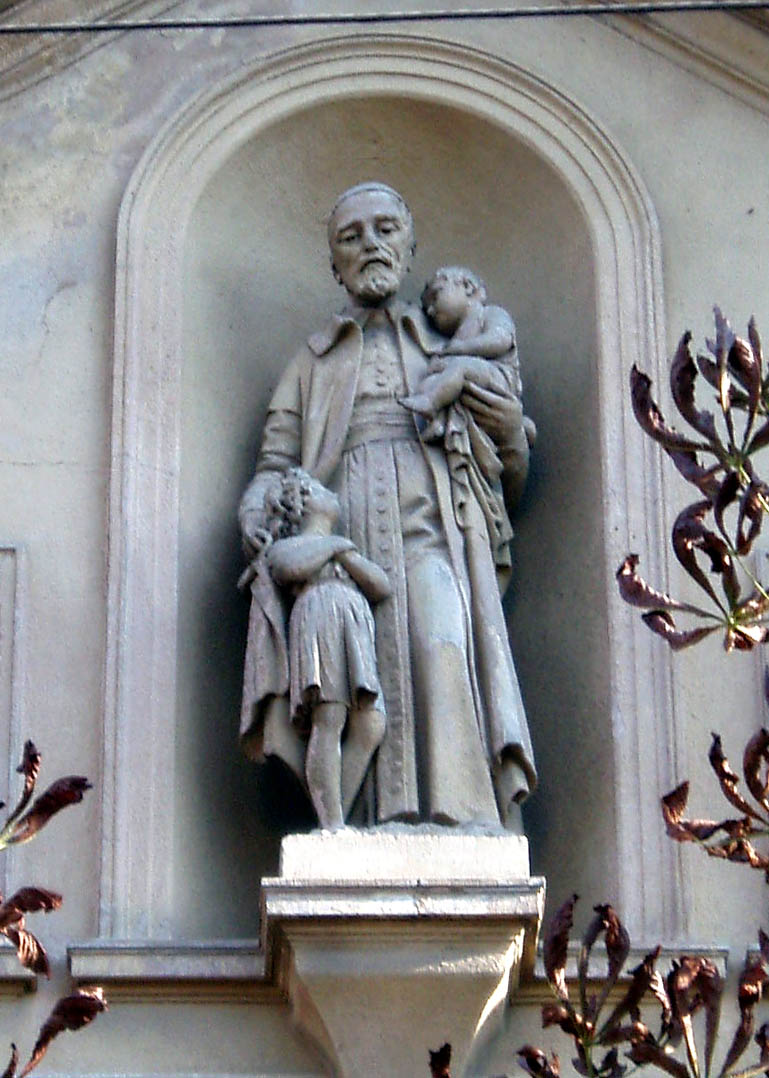 Скульптура св. Вінсента де Поля уміщена близько 1890 року на фасаді монастиря сестер Милосердя у Львові на вулиці Кривоноса. Скульптор ймовірно Антоній Попель (1865—1910